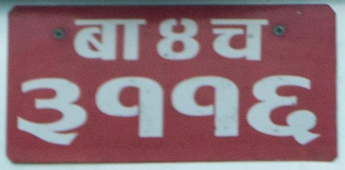 Зображення номерного знаку